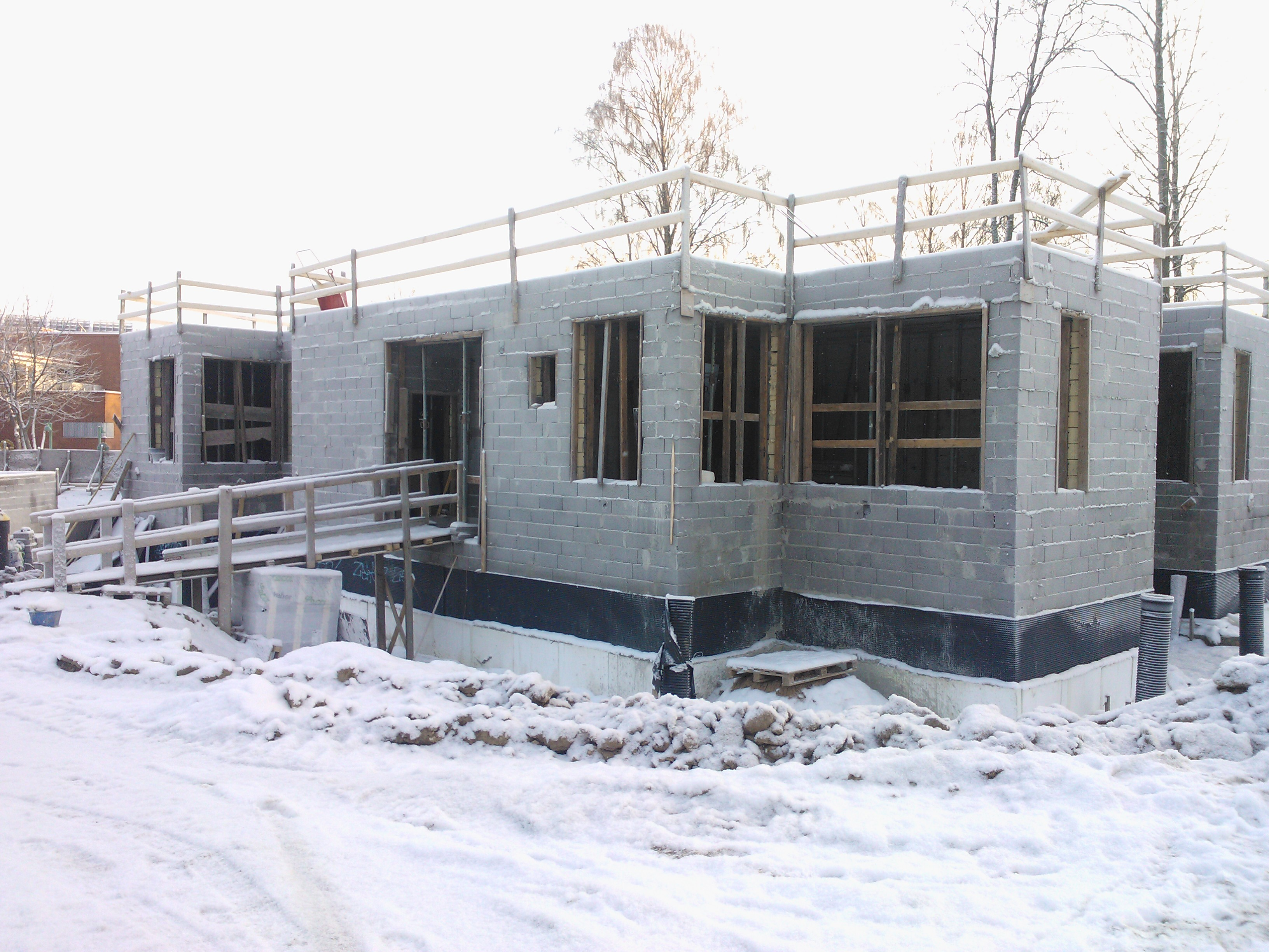 Nikolauksen ja Ylösnousemuksen kirkoksi nimetyn kirkon suunnittelija on arkkitehti Maxim Kharitonov ja suomalaisena suunnittelijana toimii arkkitehti Markku Aalto.